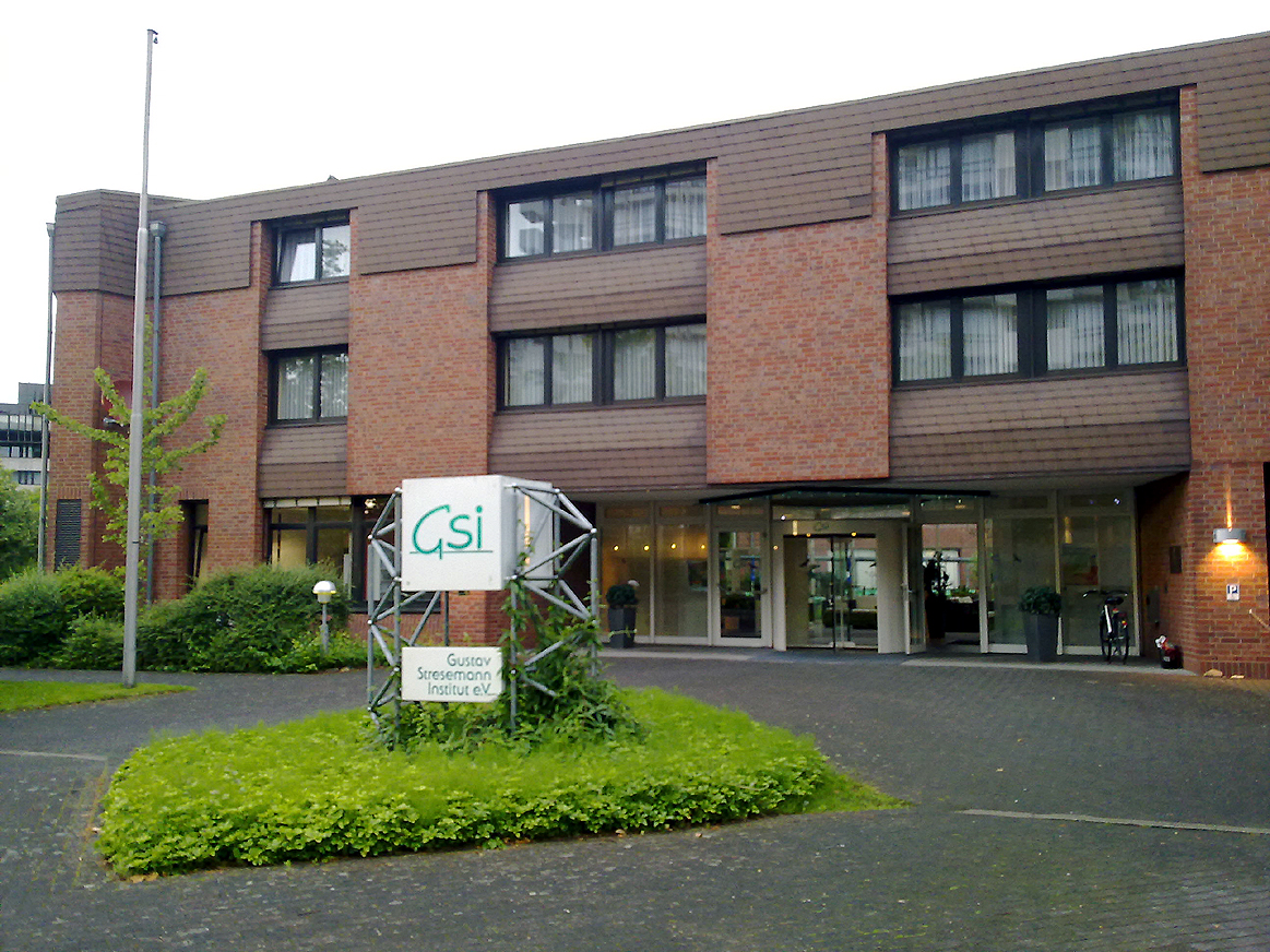 Gustav-Stresemann-Institut, Bonn